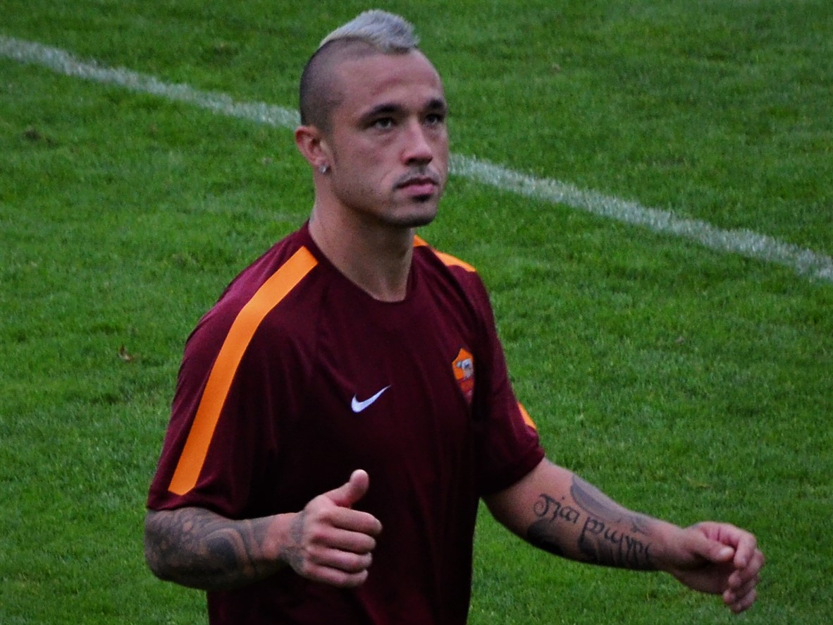 Fonte